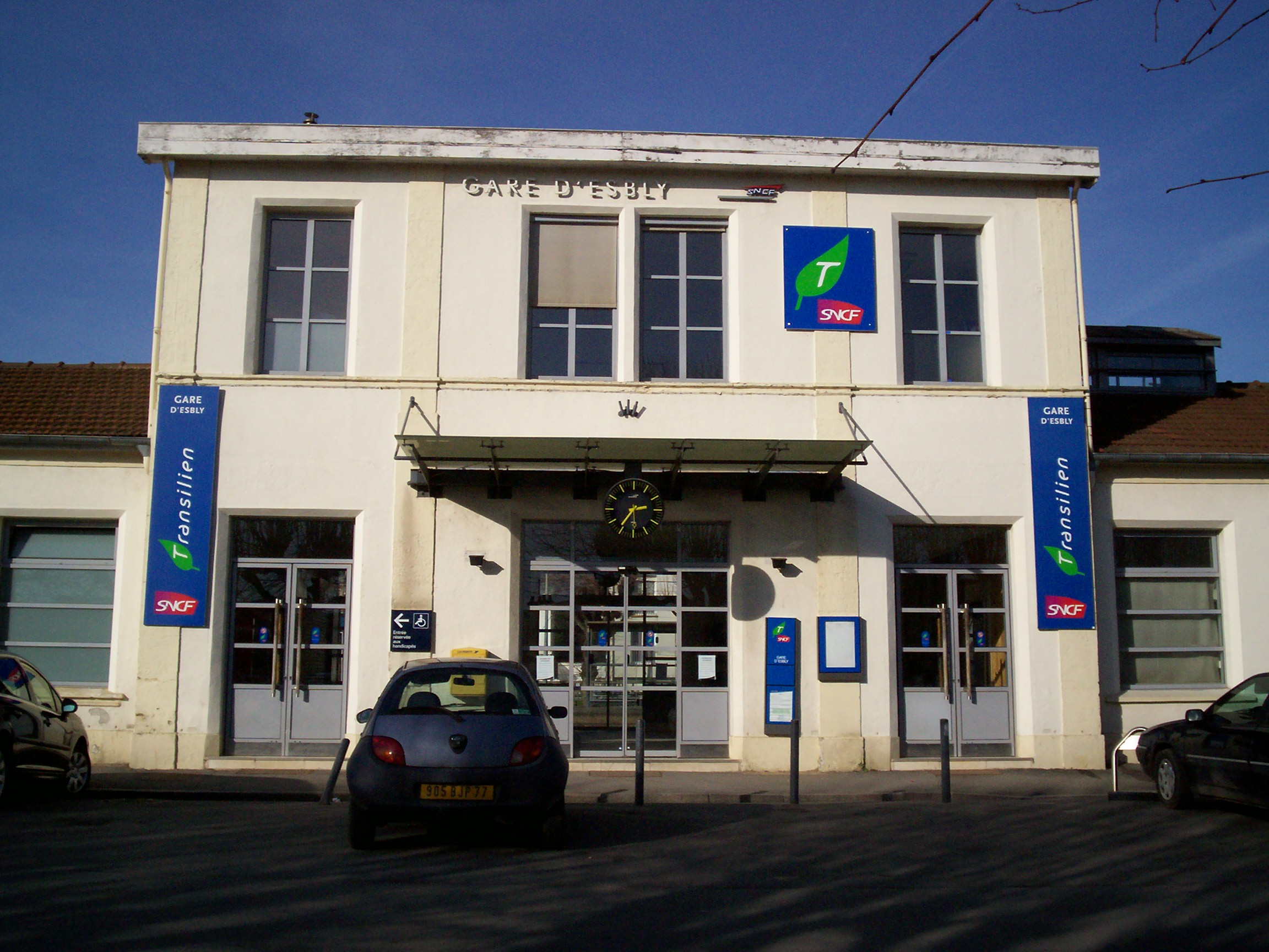 Gare d'Esbly